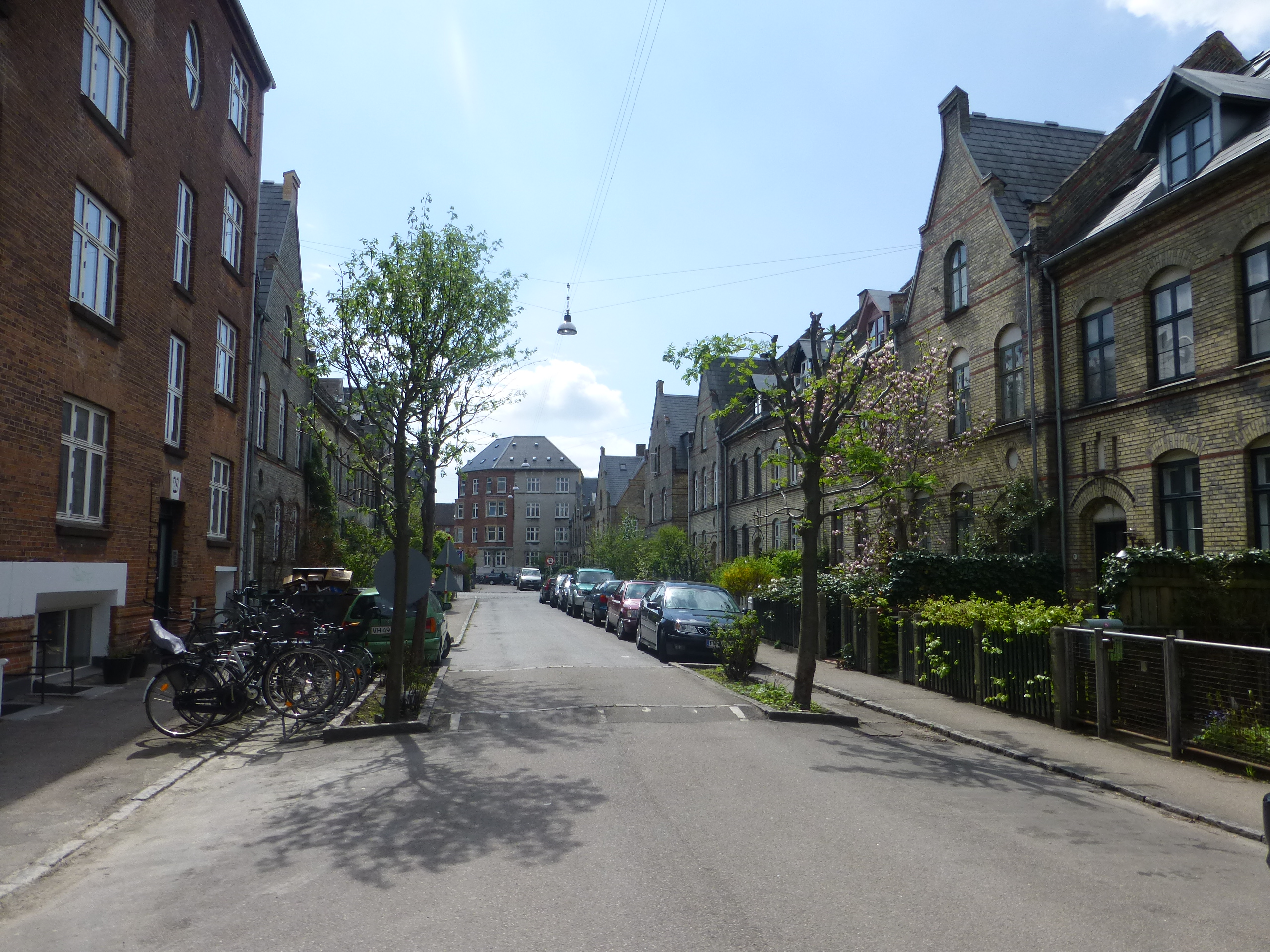 The street Hornemansgade in Østerbro in Copenhagen.